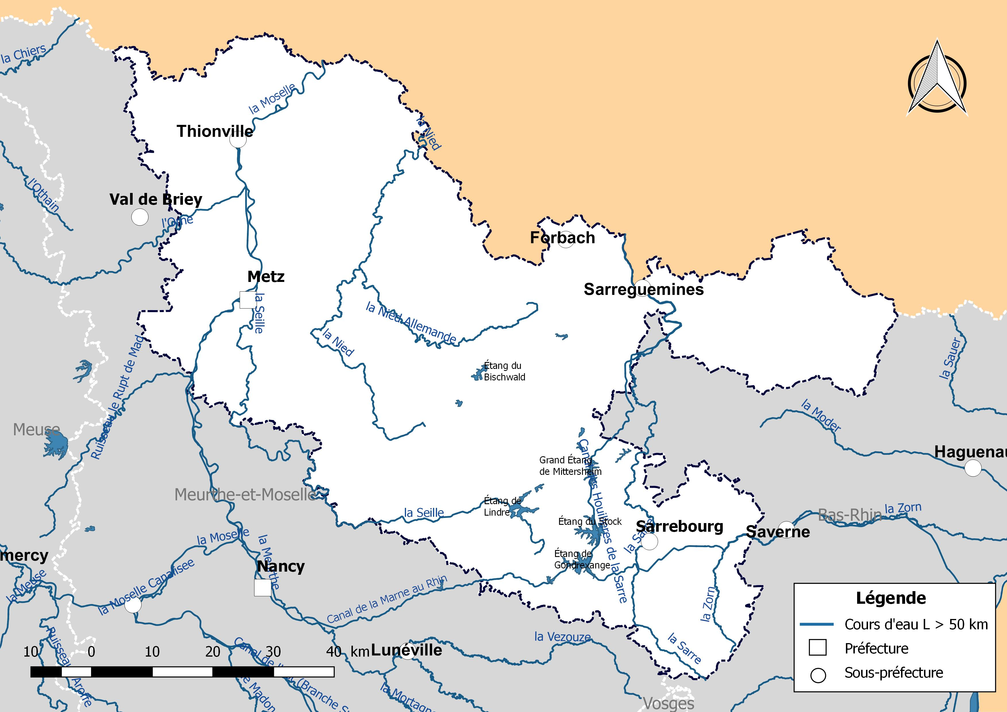 Carte des cours d'eau de longueur supérieure à 50 km drainant le département de la Moselle (France).